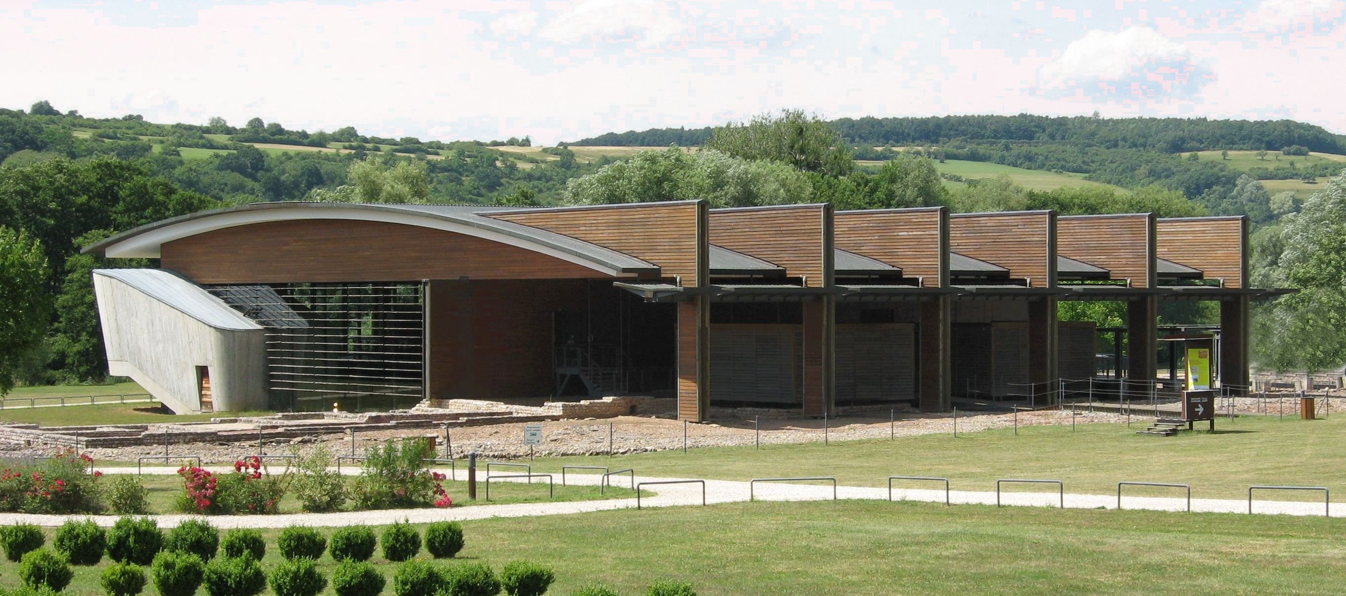 Ausgrabungen im Museumsgebäude